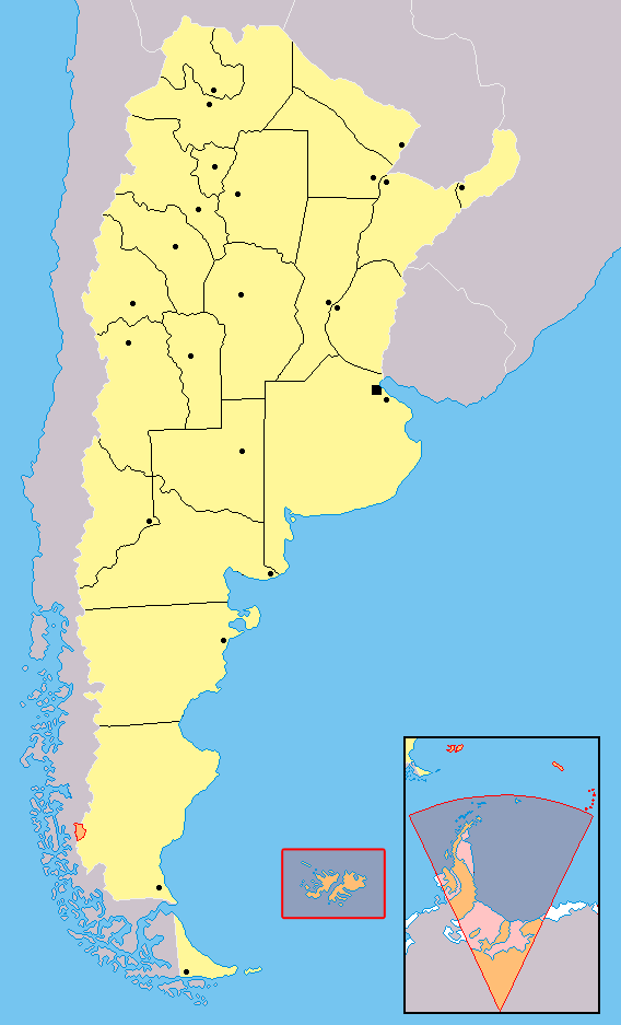 carta de las provincias de la República Argentina. Los territorios en anaranjado no están bajo la soberanía argentina: se encuentran ocupados por Inglaterra (Ej:Islas del Atlántico Sur) o es un reclamo en suspenso (Ej:Antártida)